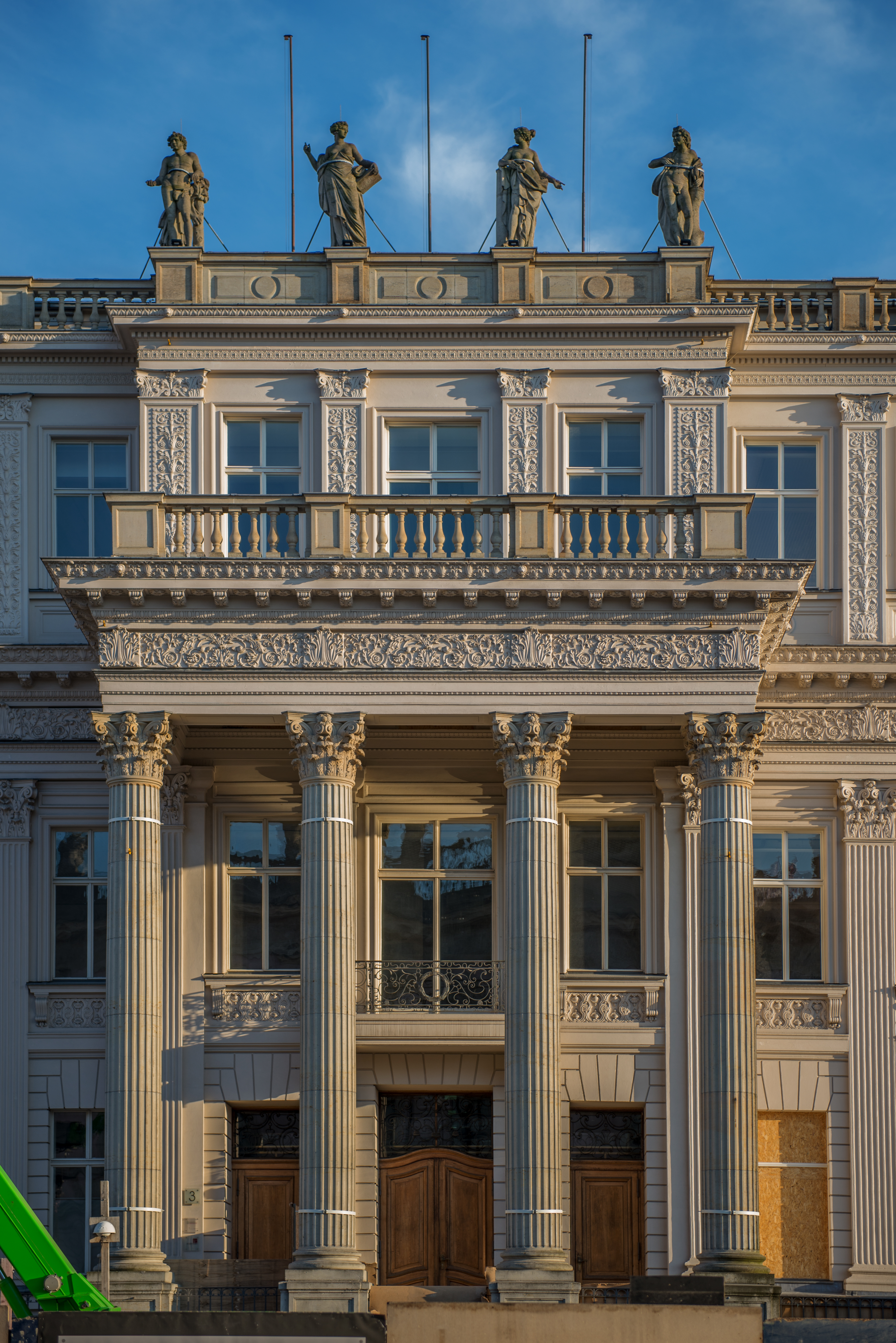 Berlin Kronprinzenpalais Fassade 2017